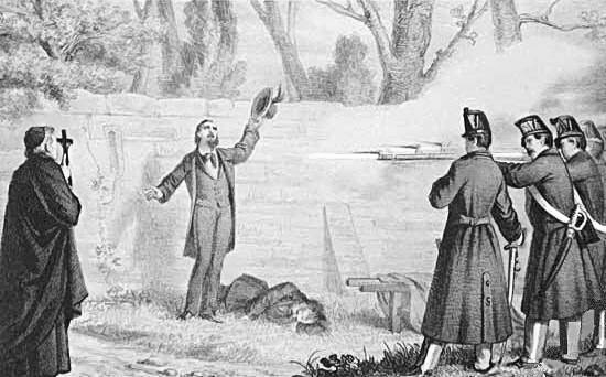 "La fucilazione dei fratelli Bandiera" ridotto, litografia